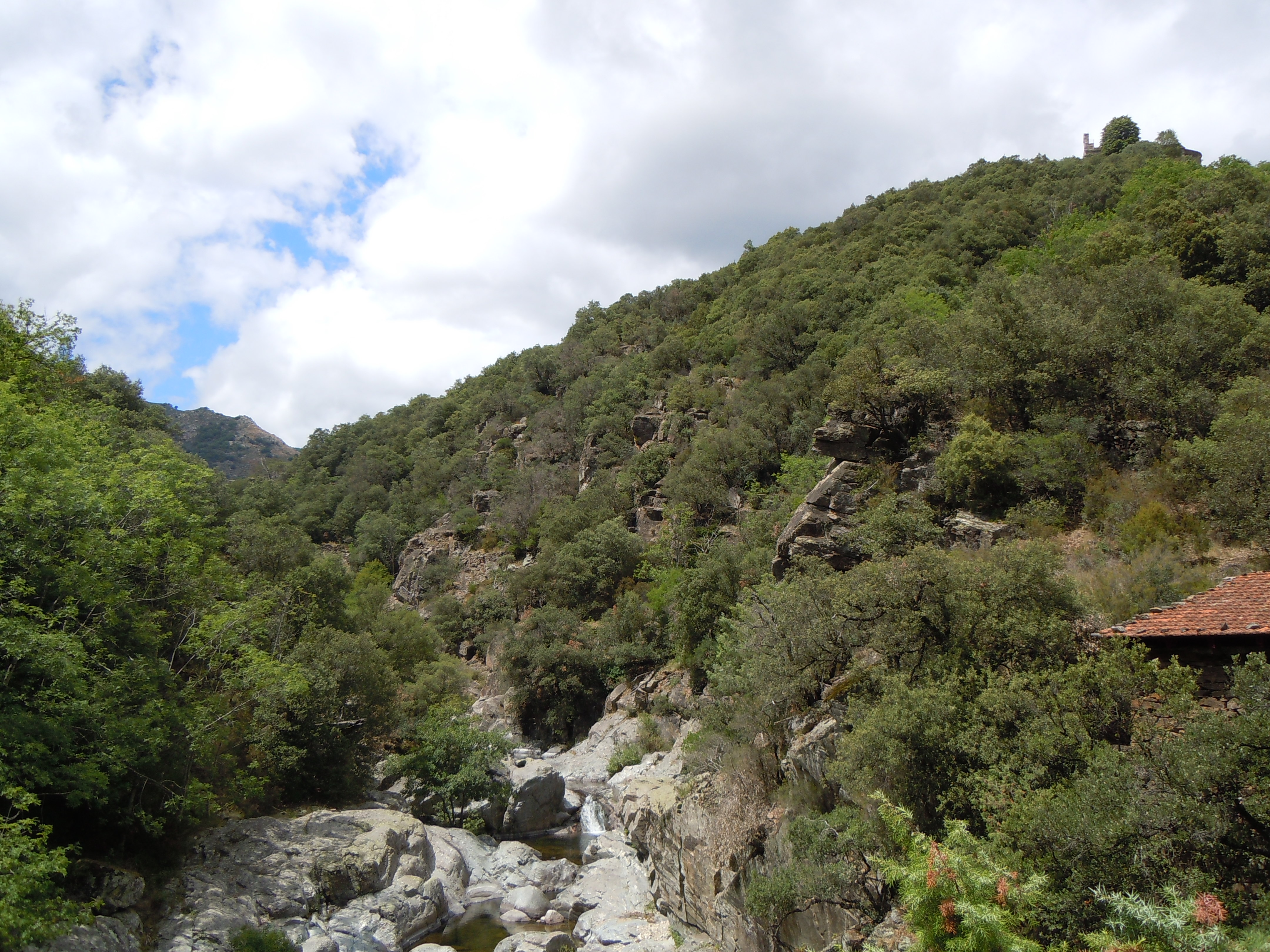 La Thines - Ardèche - France - Au pont de Gournier.